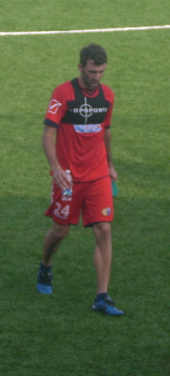 Gennaro Delvecchio al centro sportivo di Torre del Grifo Village